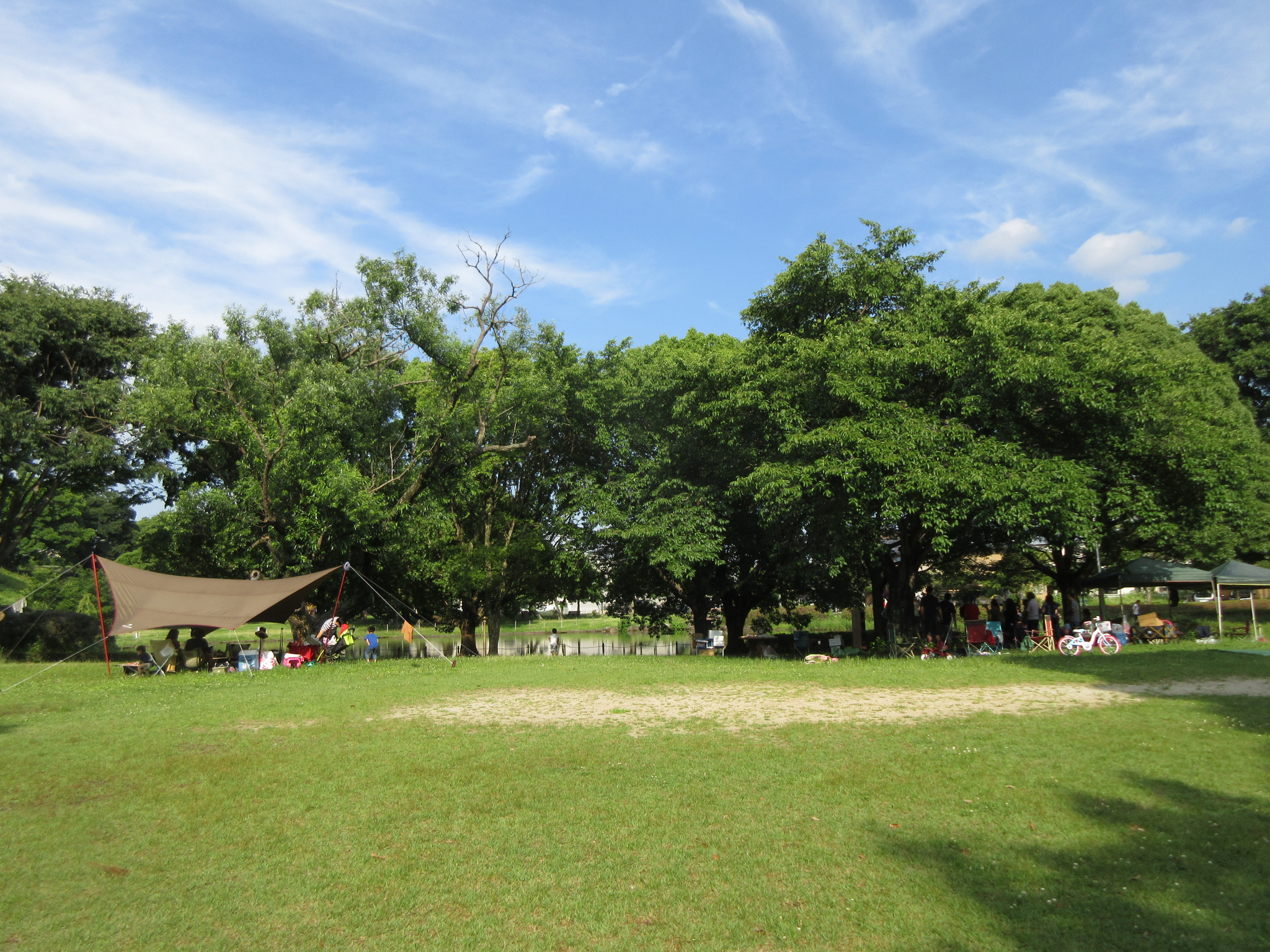 大門公園（岡崎市大門）